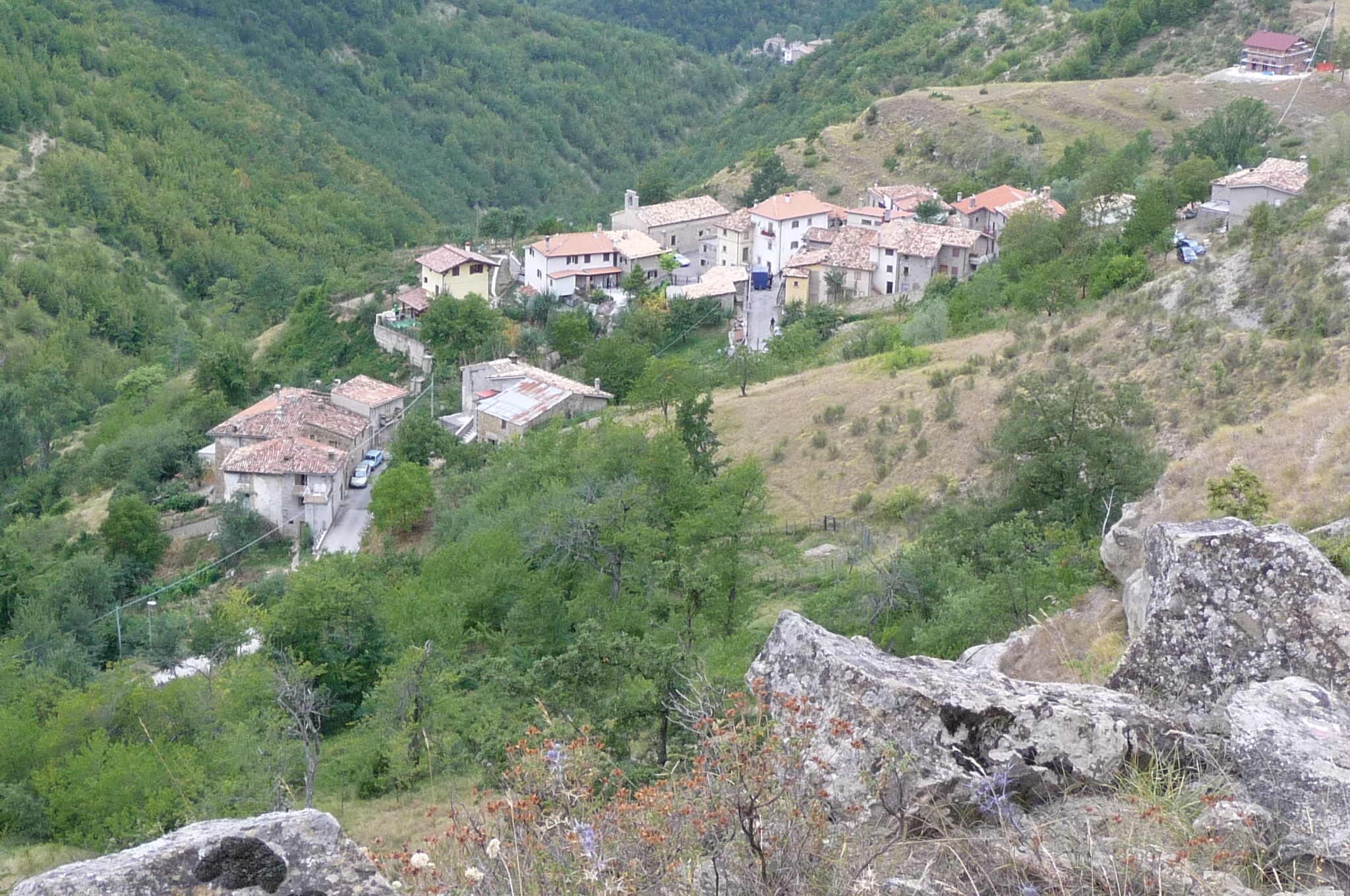 Veduta di Crognaleto